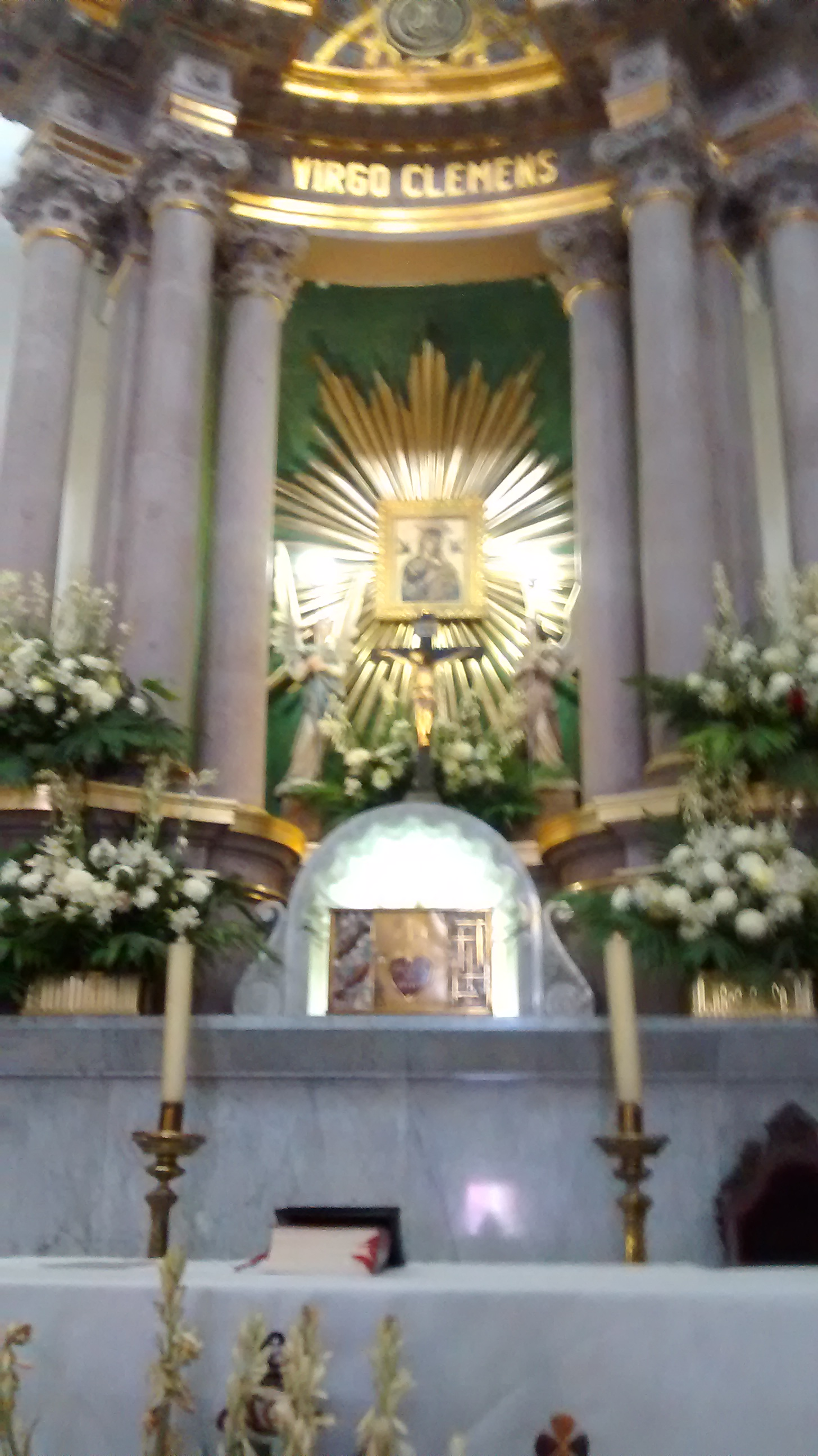 Convento Pasionista del Perpetuo Socorro